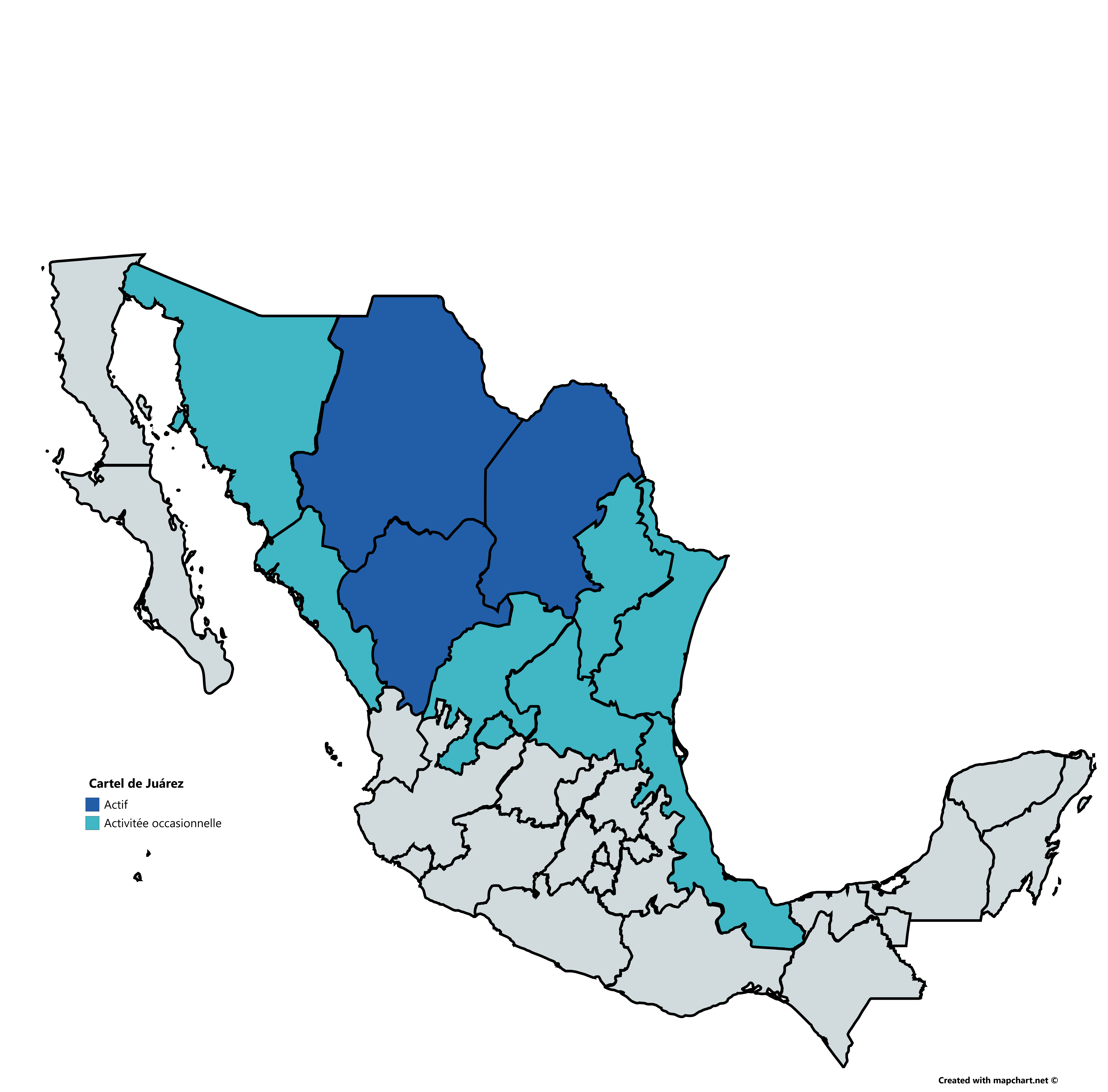 Cartel de Juárez activity maps